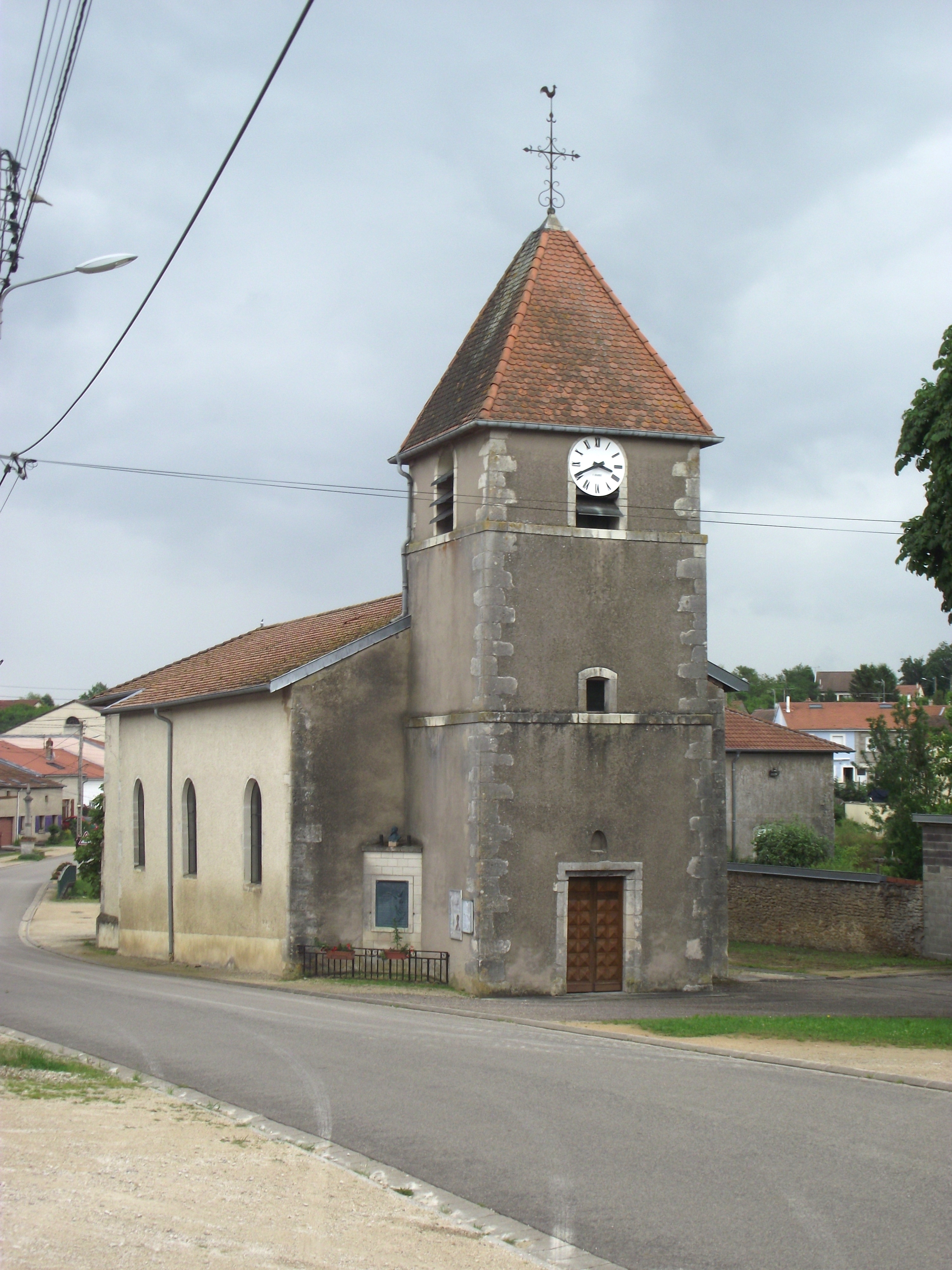 Eglise de Moutrot (54)